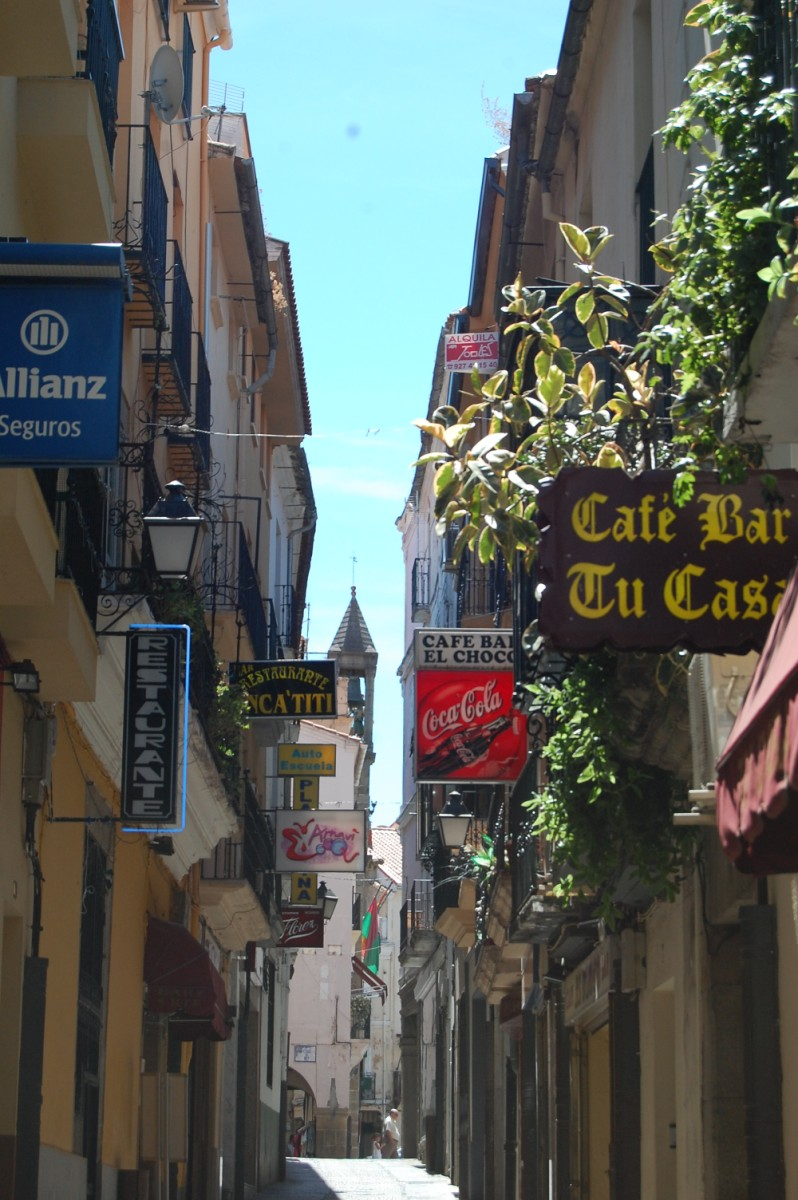 LA MUY NOBLE Y LEAL..NIKON D40 131